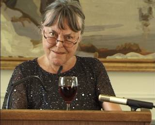 Inge Eriksen. Ved et møde i Modersmål-Selskabet.